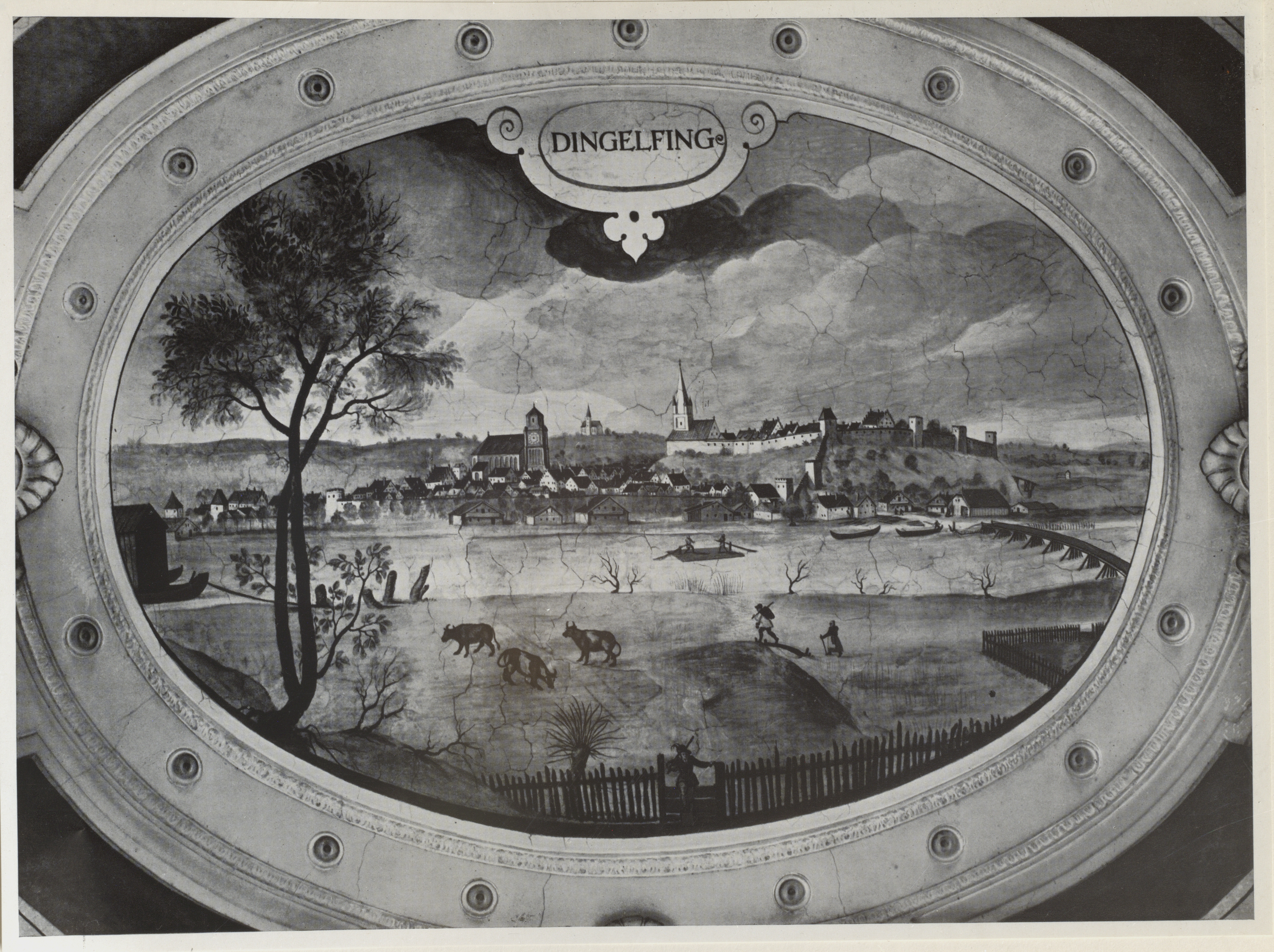 Älteste Ansicht von Dingolfing